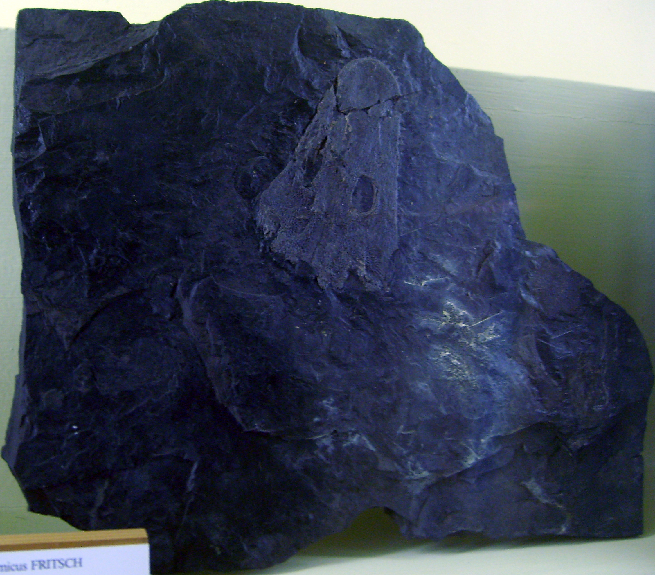 Cochleosaurus bohemicus skull at the Museum für Naturkunde, Berlin.